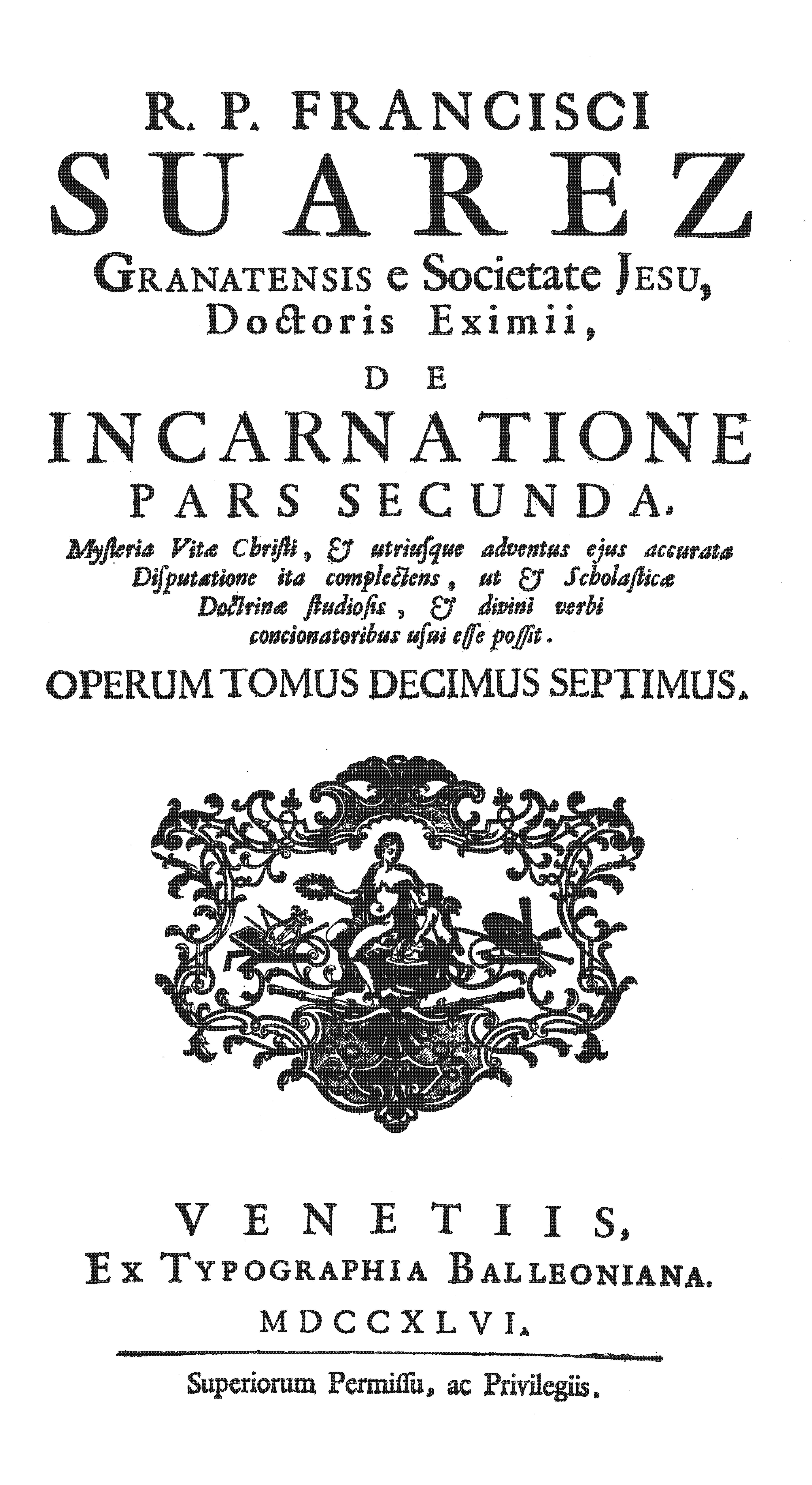 Portada del libro De incarnatione (parte segunda). Publicado en latín por Francisco Suárez en Venecia, edición de 1746.